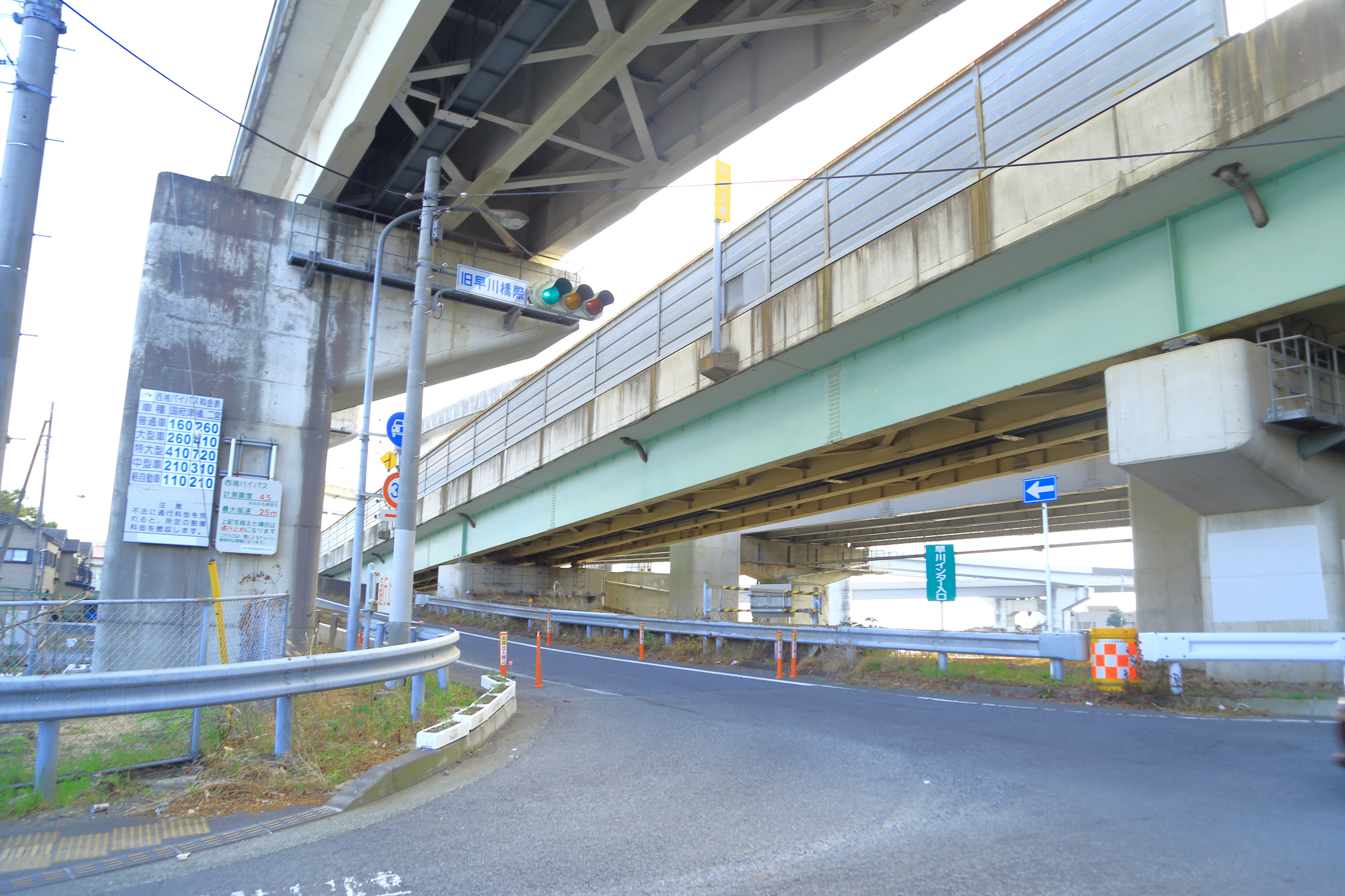 神奈川県小田原市早川インターチェンジ。